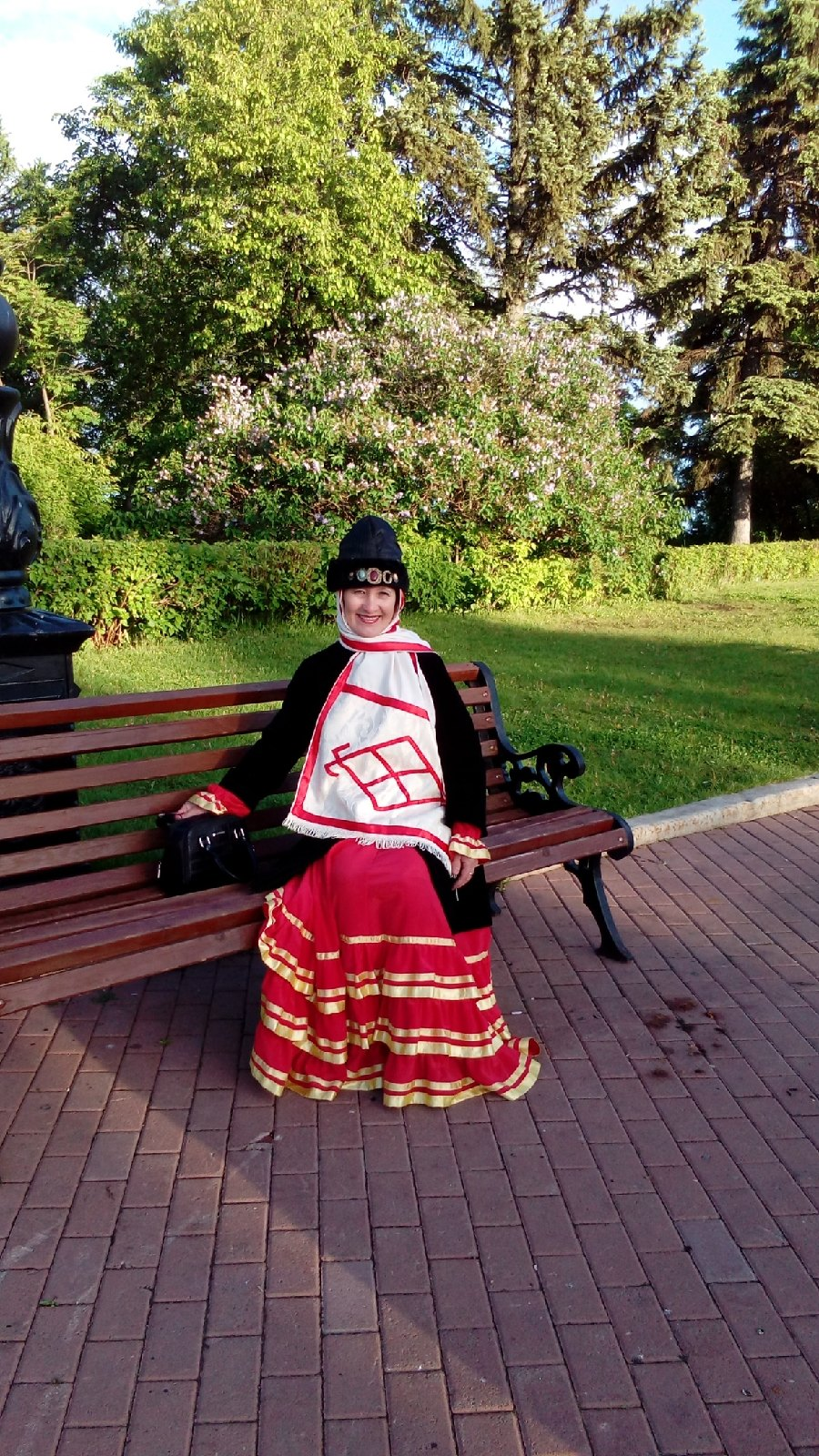 Башкирские женские головные уборы - тастар и тупый (таҫтар и тупый)